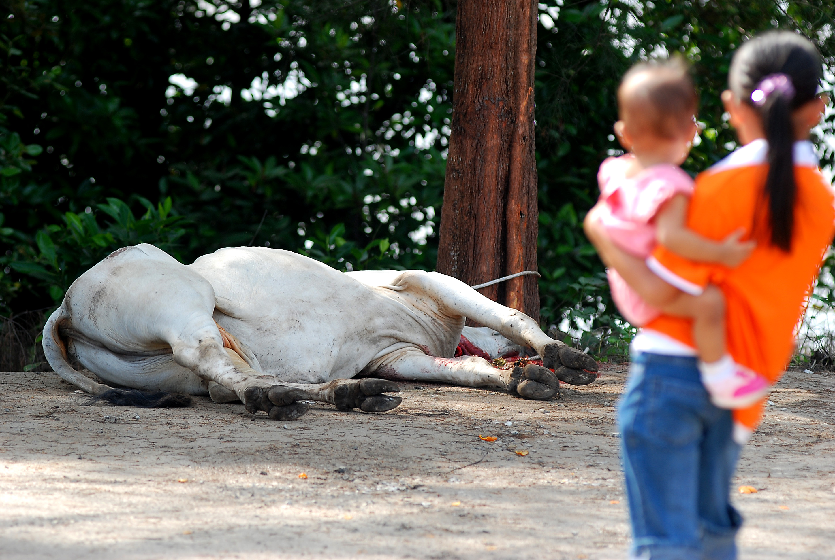 Religious animal sacrifice